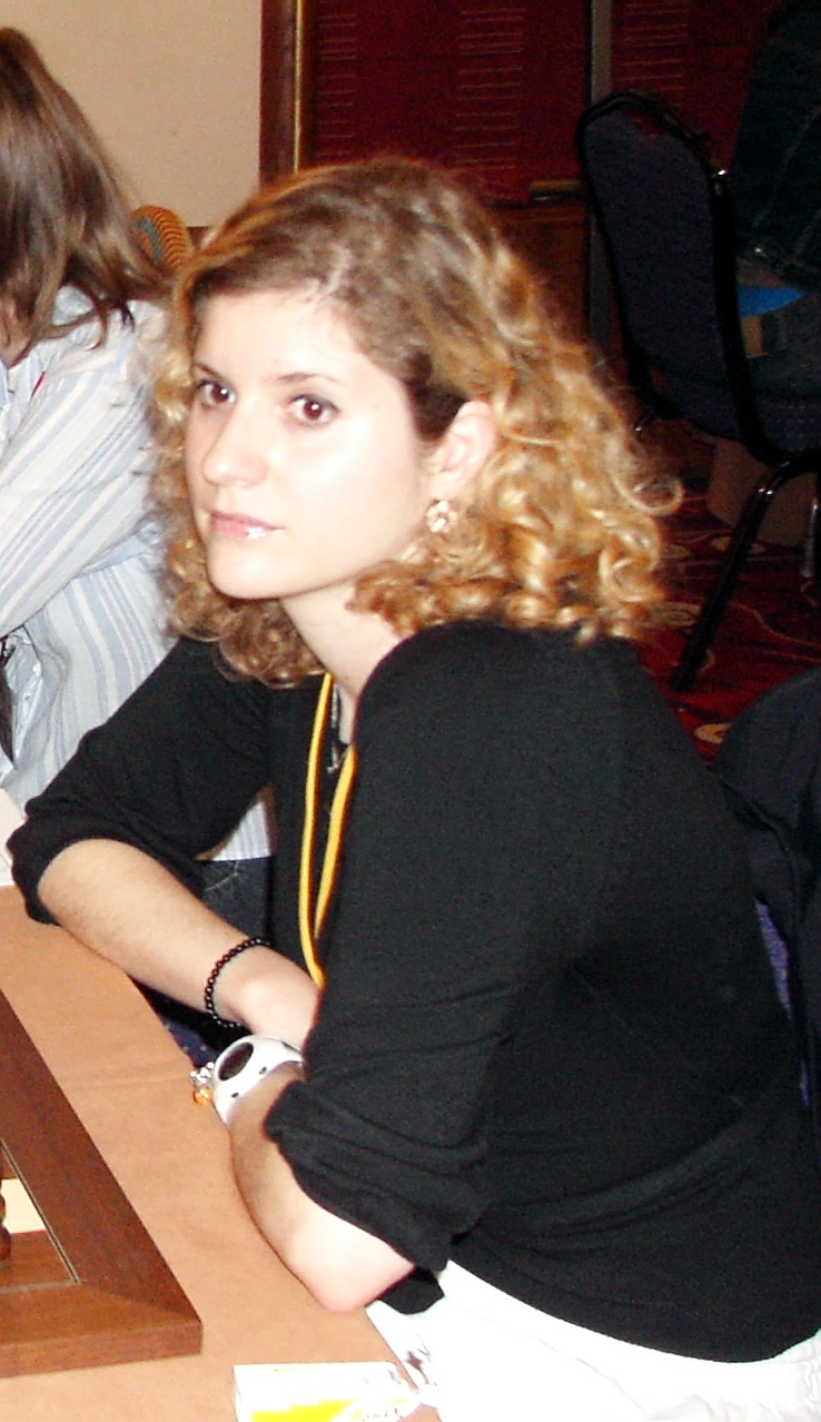 WGM Jovanka Houska England, EuroChess Iraklion 2007